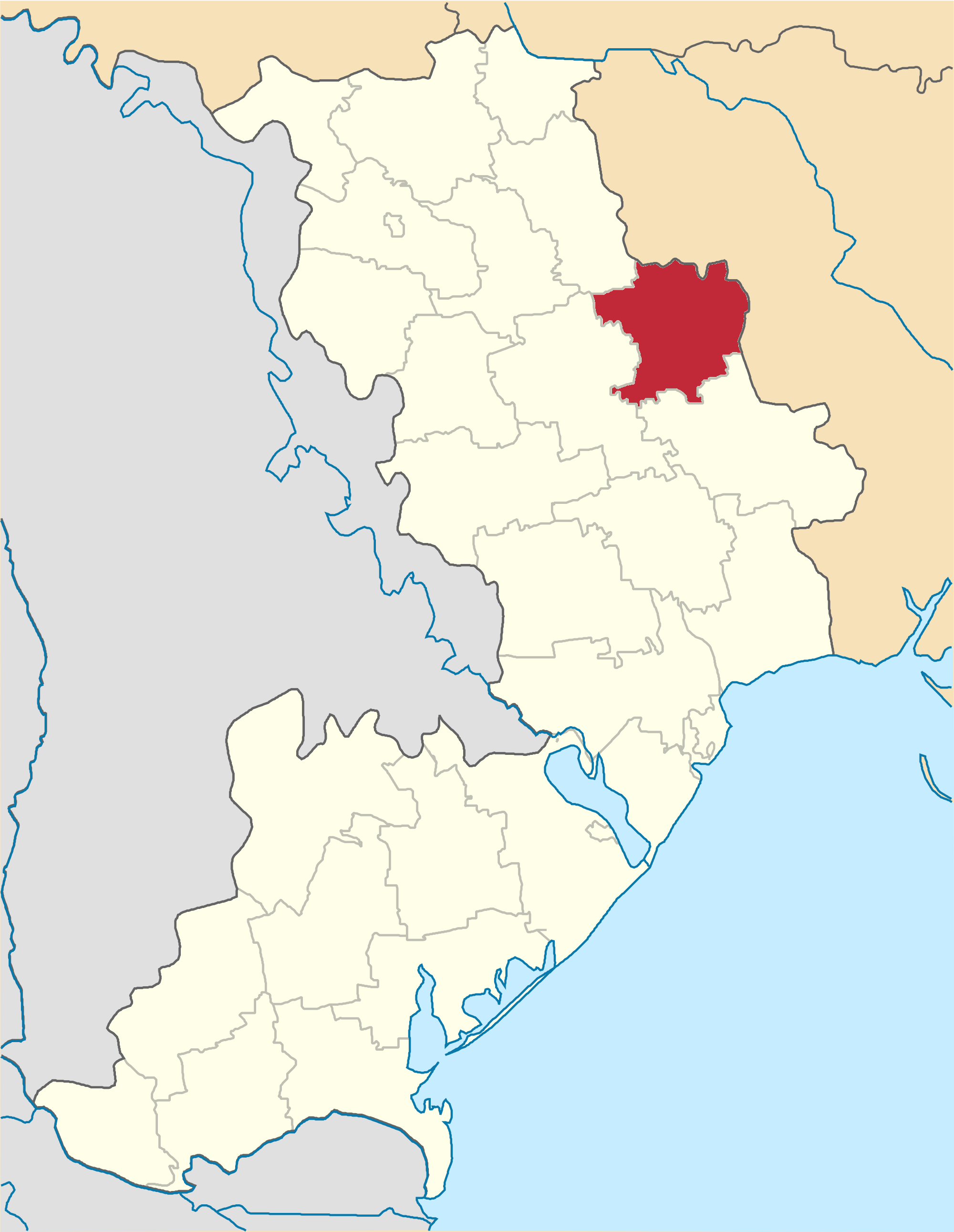 Mykolayivskyi-Raion map